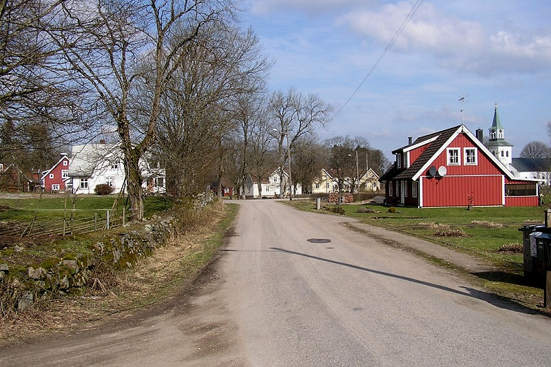 Gamla landsvägen genom Loshults by, strax innan kyrkan.